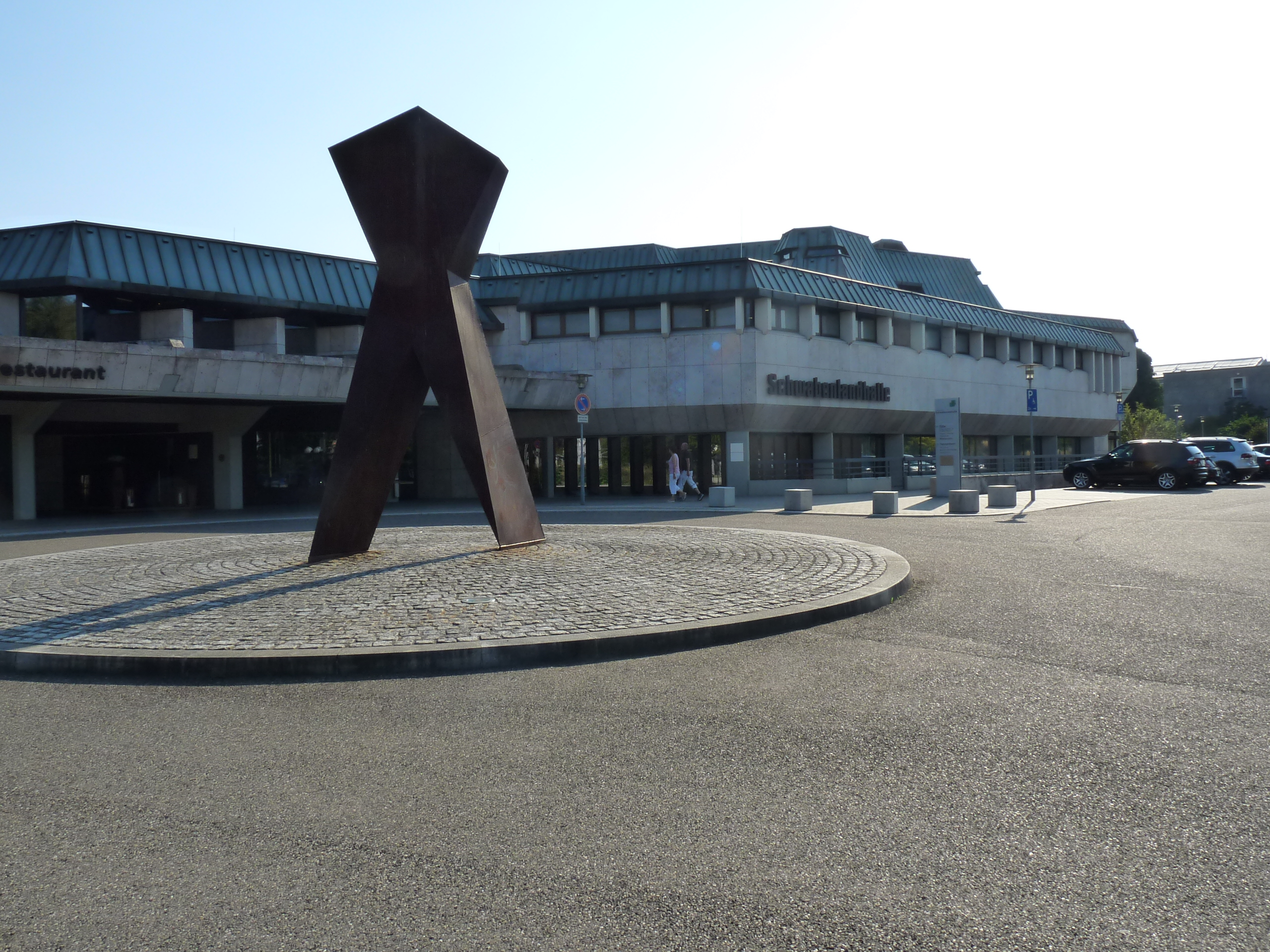 Fellbach - Schwabenlandhalle - Seite